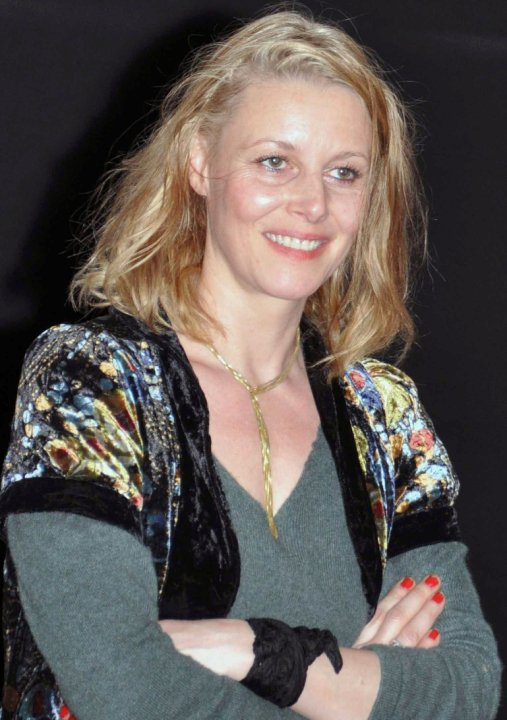 Florence Thomassin à l'avant-première du film Tête de turc.